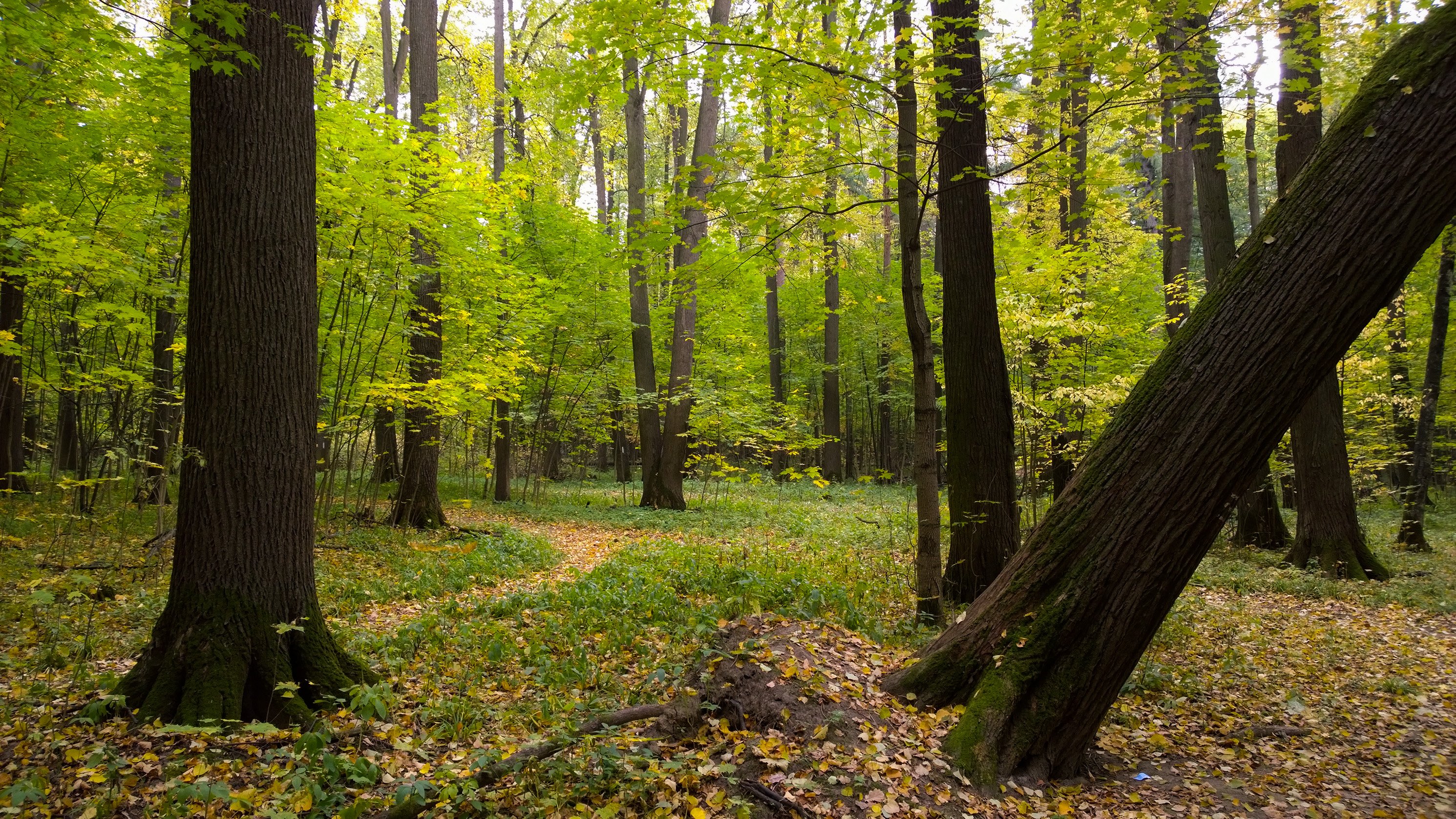 Измайлово, Восточный округ This image is related to the protected area of Russia number 7710138